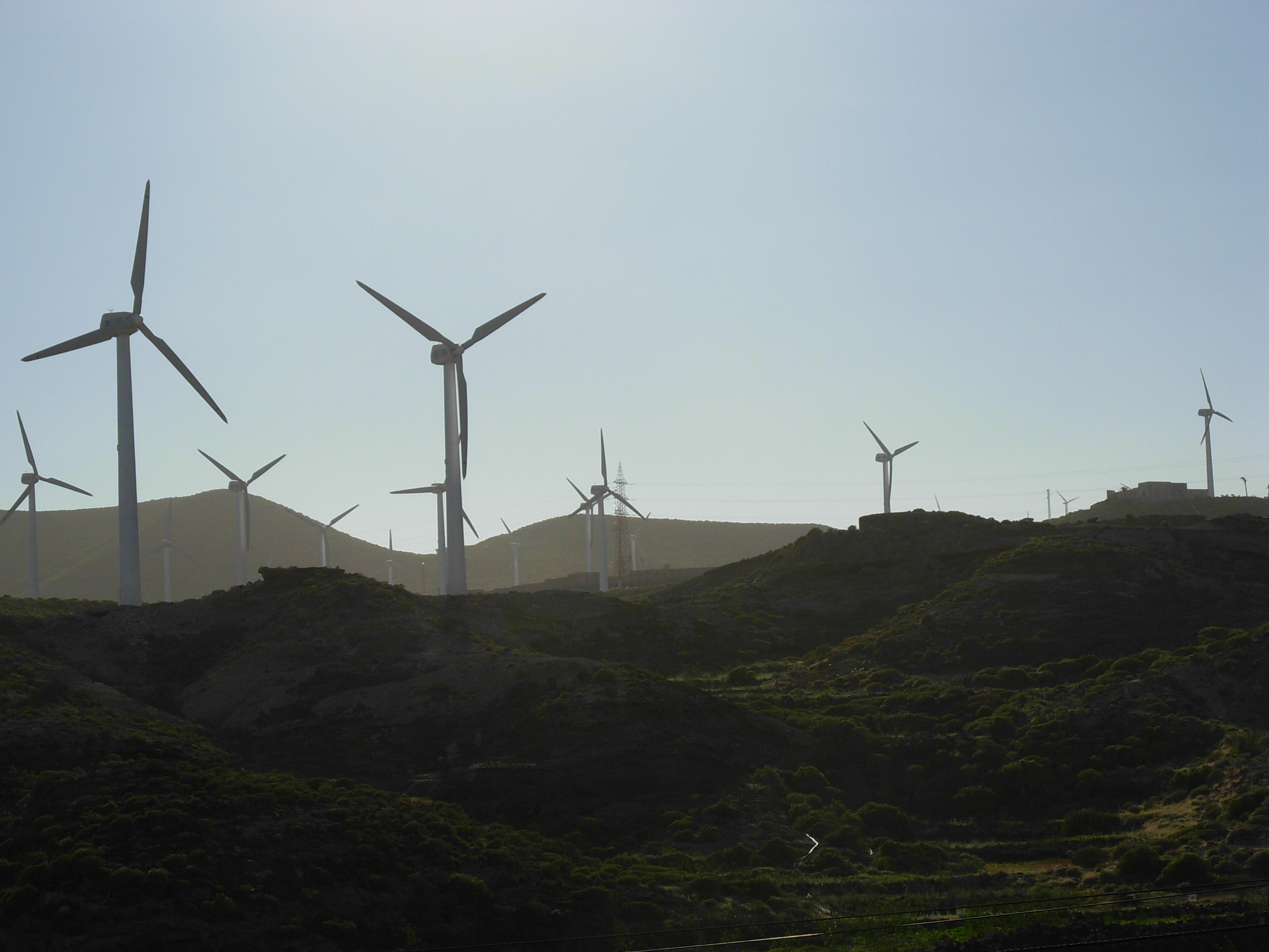 Wind generators seen from TF1 Motorway, Spain, Tenerife (Autopista del Sur).